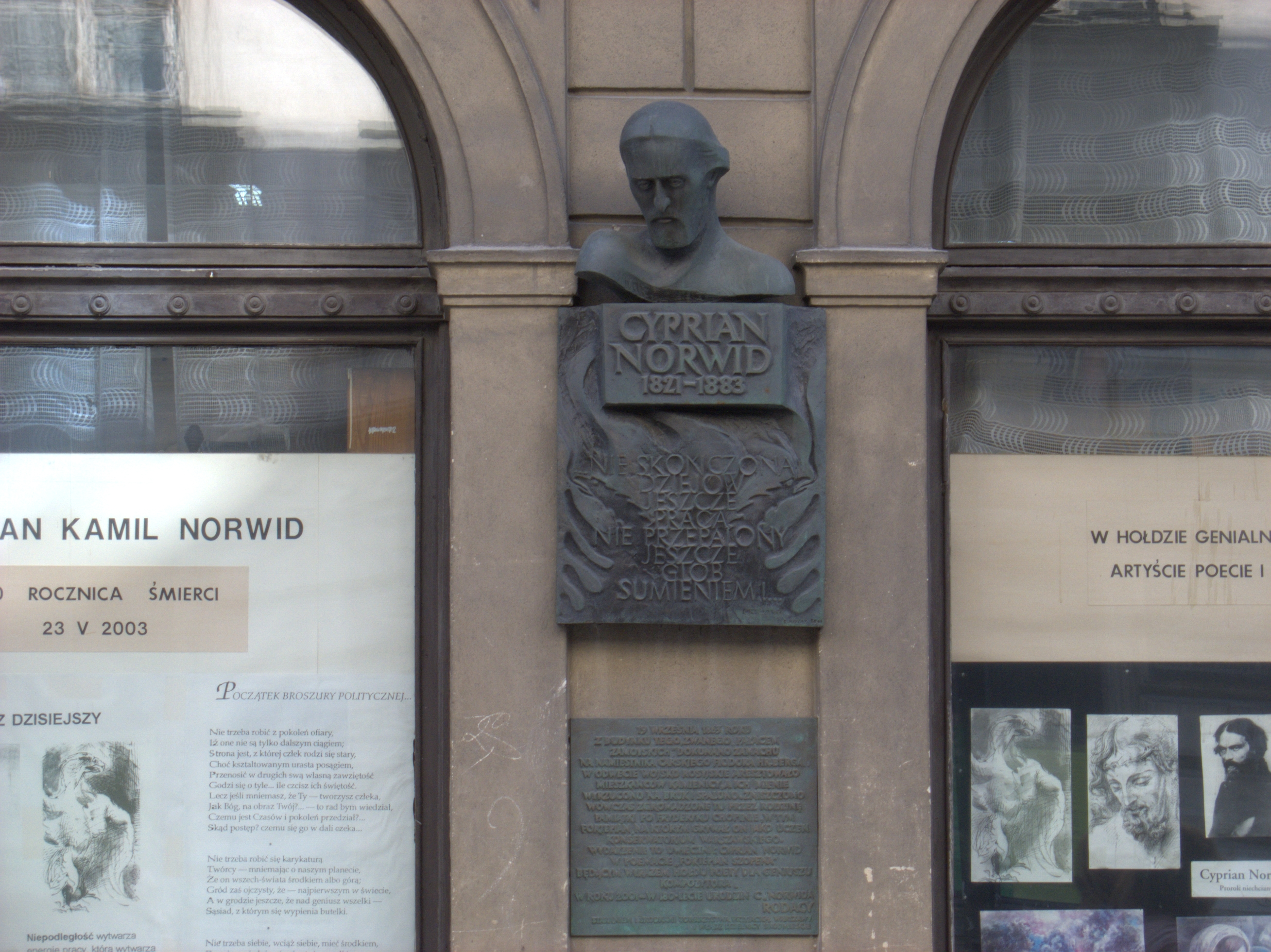 Tablica ku czci C.K.Norwida na budynku przy ulicy Nowy Świat